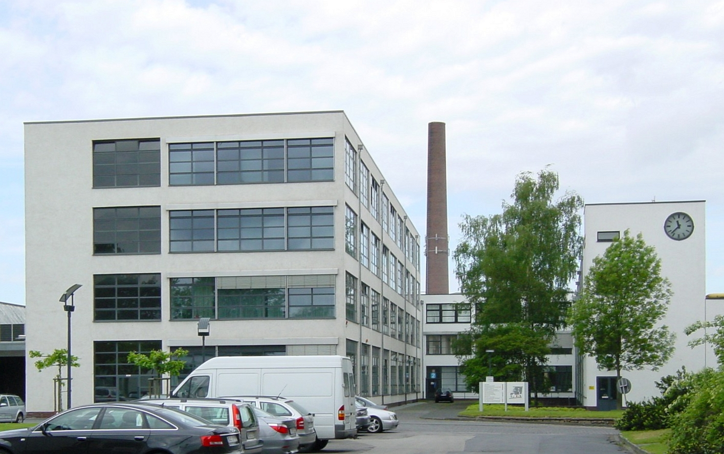 ehem. Hauptgebäude, VerSeidAG - heute Ludwig Mies van der Rohe Business Park, Krefeld